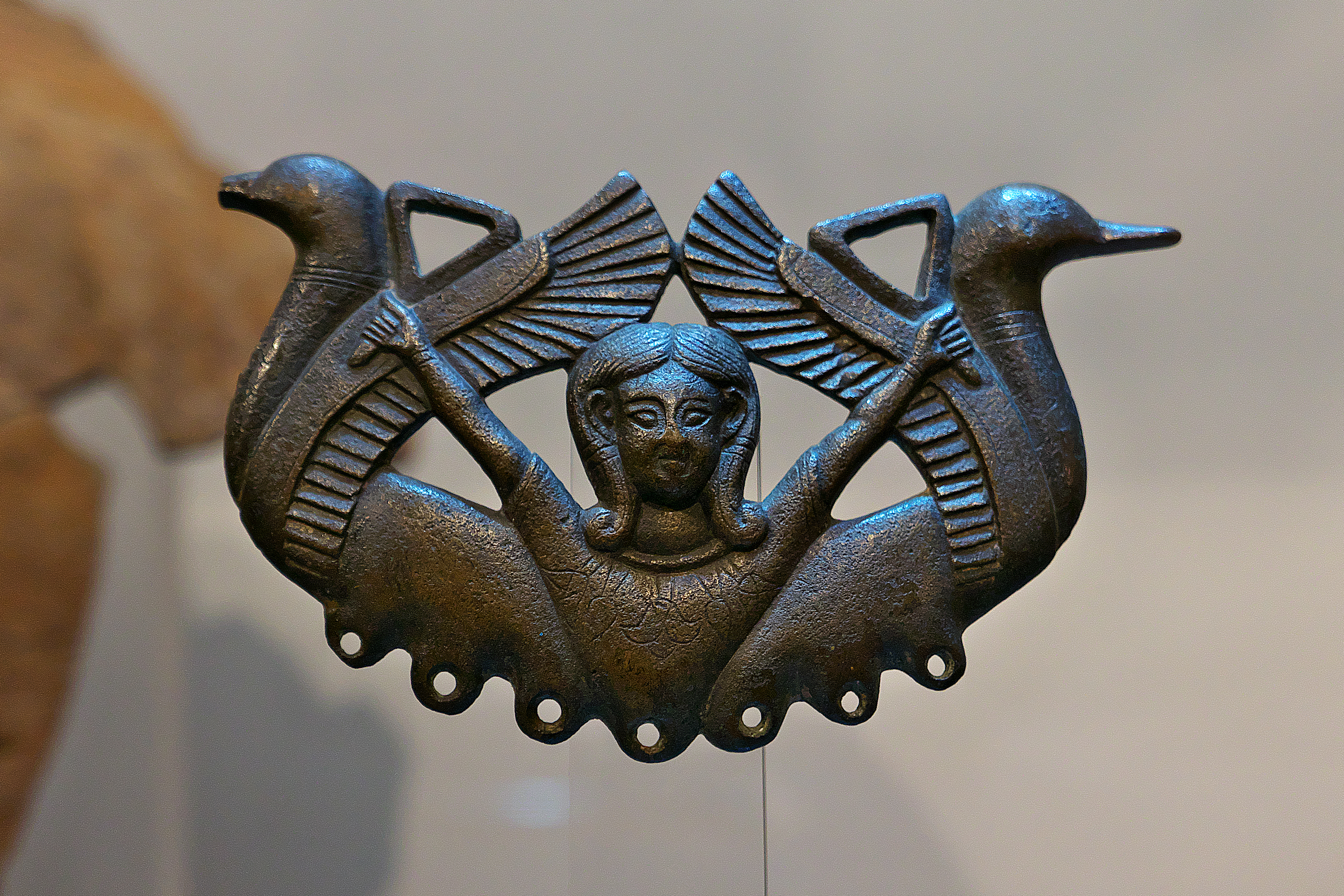 La diosa Astarté en un bocado de caballo (s. VII a.C.), alzando dos sistros entre dos aves con alas.